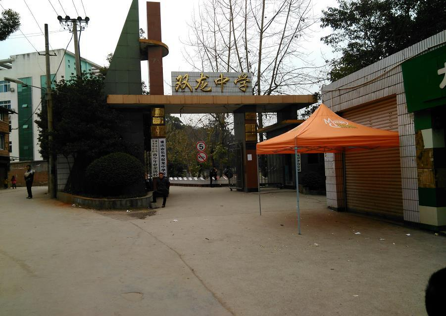 重庆市长寿双龙中学校，校大门。这是我自己个人的作品，我授权维基百科使用。